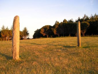 Les menhirs de Lambert sont les plus haut du Var. On y accède par le GR90 depuis le village de Collobrières après 2h de marche.